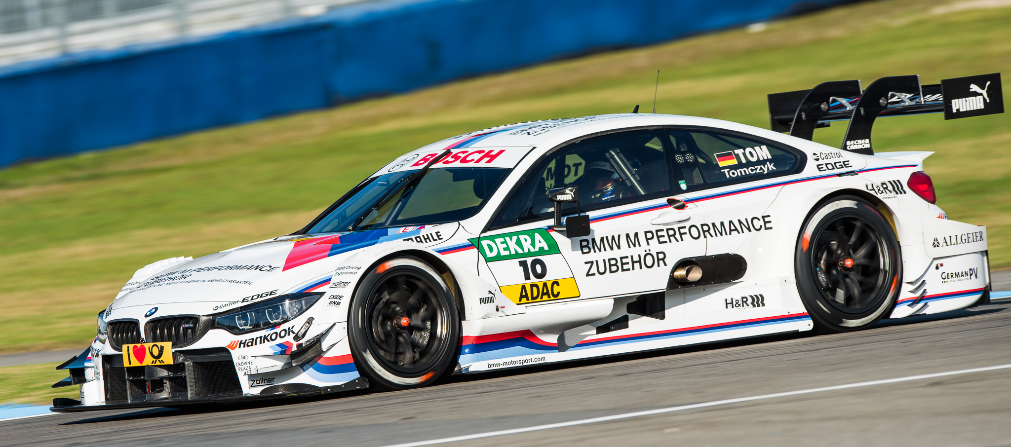 BMW M Performance Zubehör M4 DTM,DTM,Deutsche Tourenwagen Masters,Hockenheimring,Martin Tomczyk,Motorsport